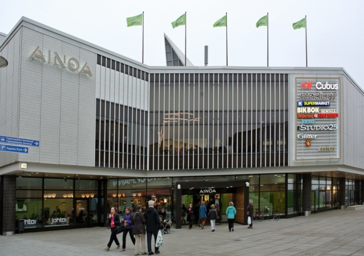 Kaupunkikeskus Ainoa Espoon Tapiolassa.